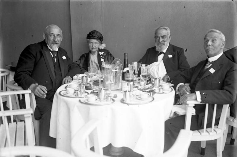 Die grosse Weltkraft-Conferenz in Berlin! Das Präsidium der Weltkraft-Conferenz in Berlin von li.n.re.: der Vorsitzende der Weltkraft-Conferenz Generaldirektor Dr. Ing. Köttgen, Frau Exellenz von Miller, der Ehrenpräsident Exellenz von Miller, der Gründer des Deutschen Museums in München, der Vizepräsident Dr. Tissot.